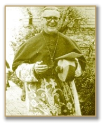 Monseñor Miguel Raspanti, obispo de la Diócesis de Morón entre 1957-1879.